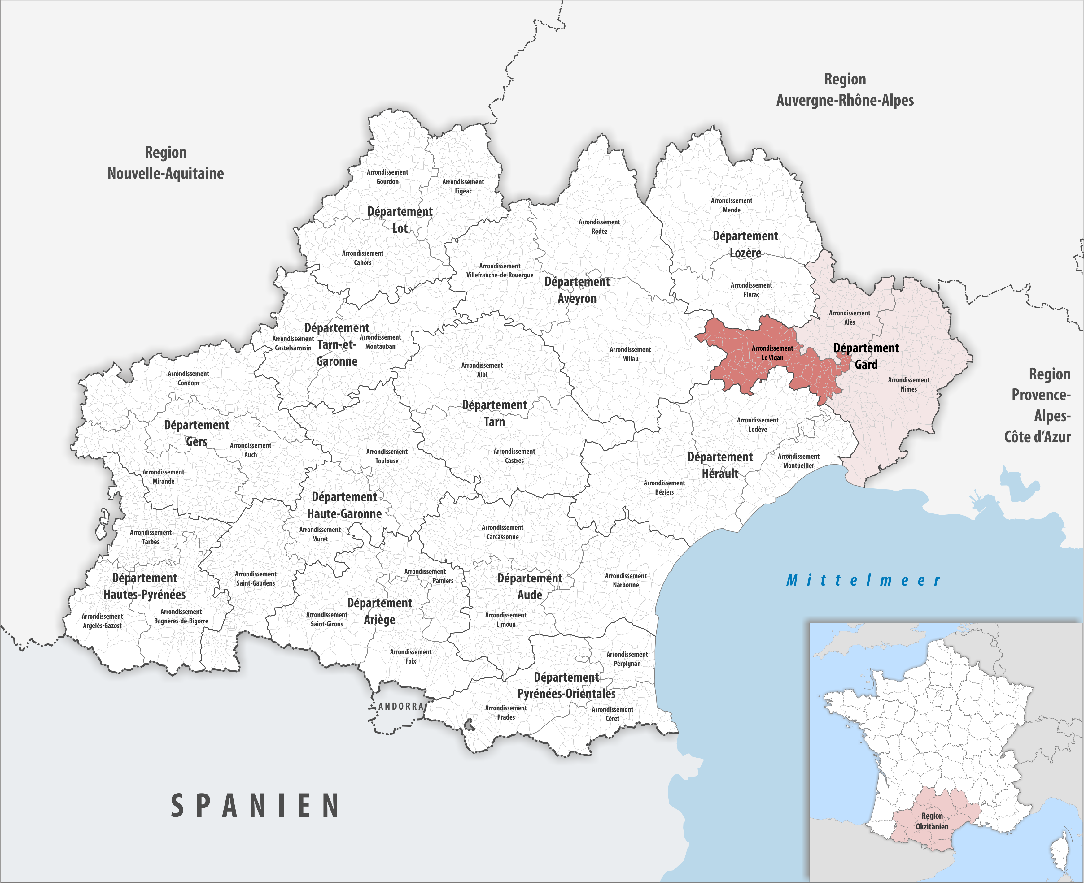 Lage des Arrondissements Le Vigan